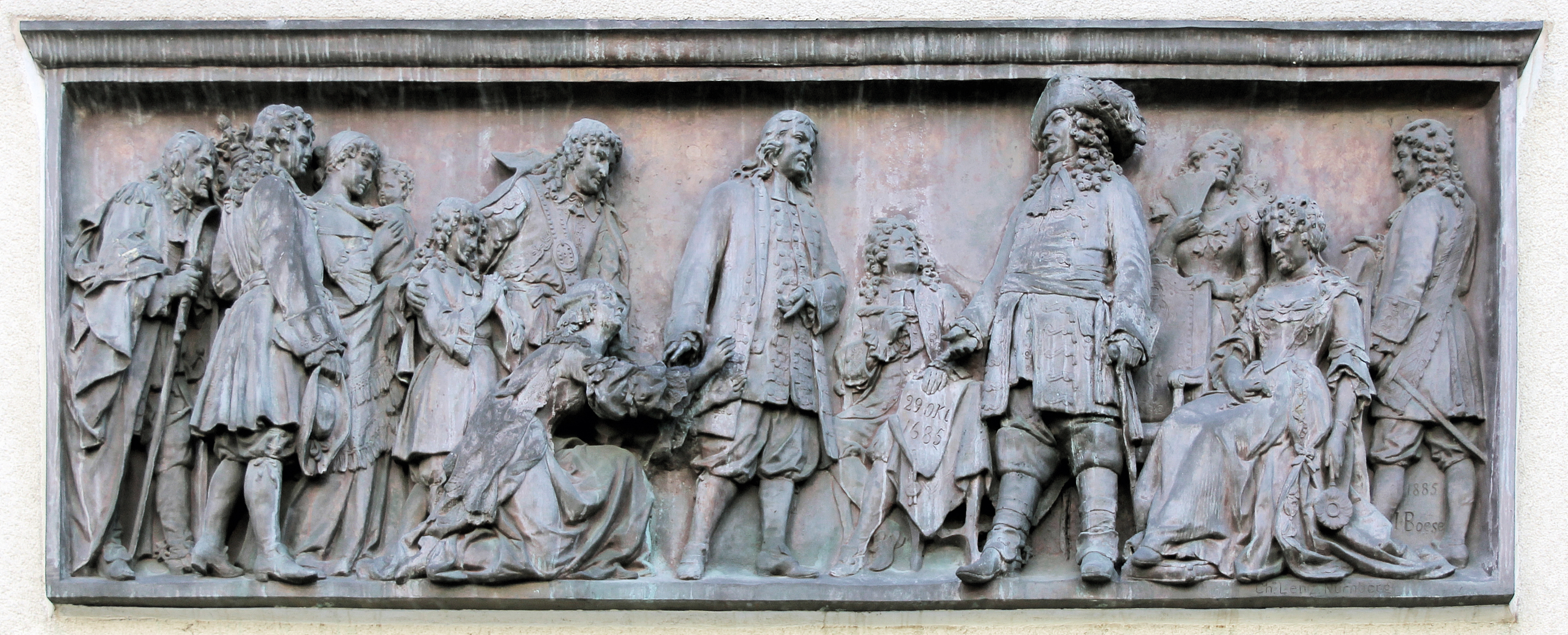 Relief von Johannes Boese, 1885, Der große Kurfürst begrüsst die Hugenotten, Joachim-Friedrich-Straße 4, Berlin-Halensee, Deutschland